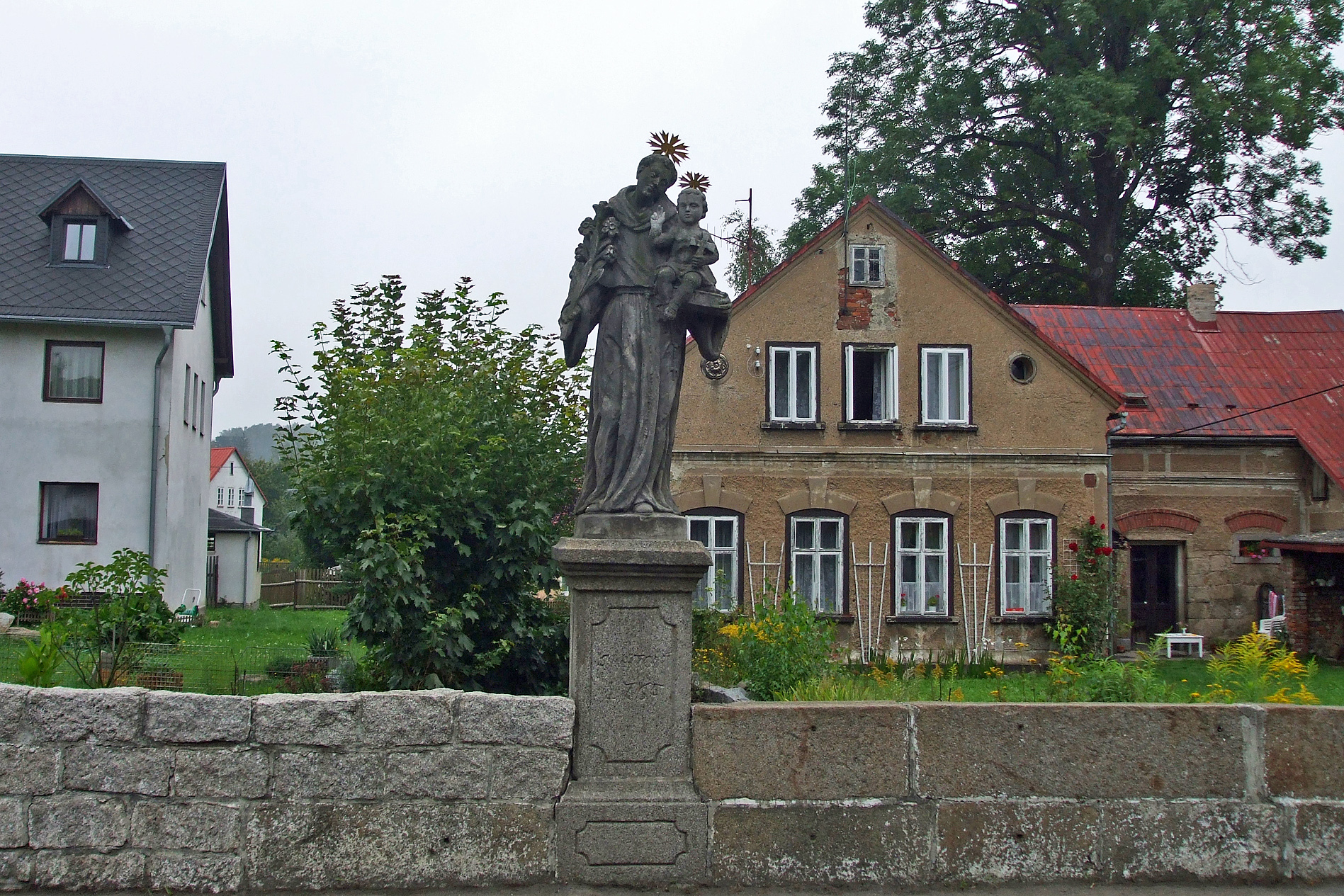 Šluknov, socha svatého Antonína, T. G. Masaryka 709.